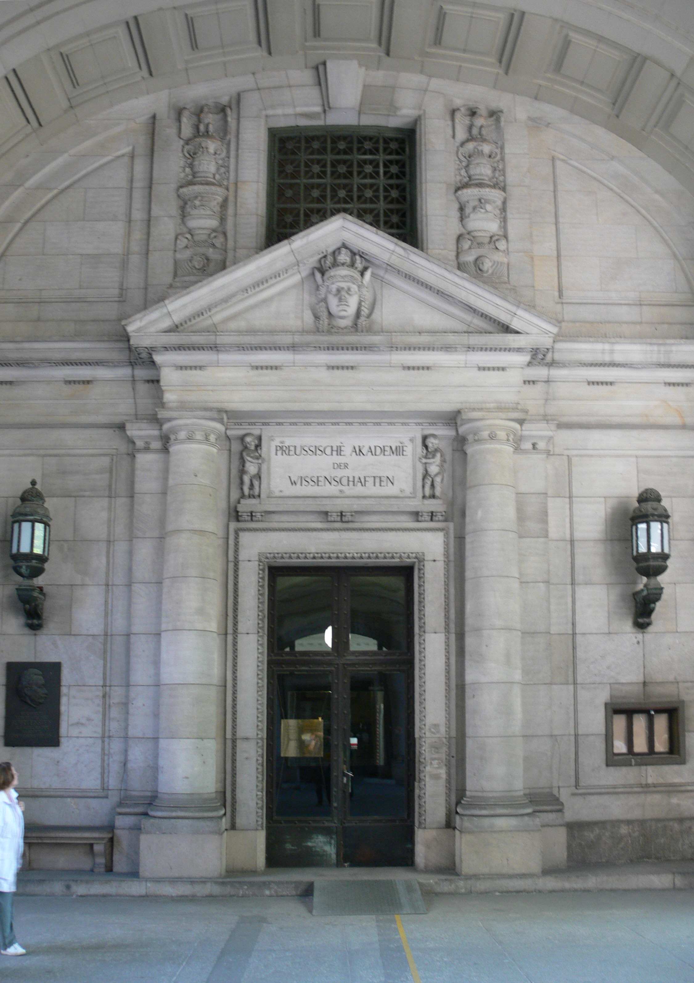 Eingangshof der Staatsbibliothek zu Berlin (Haus Unter den Linden)